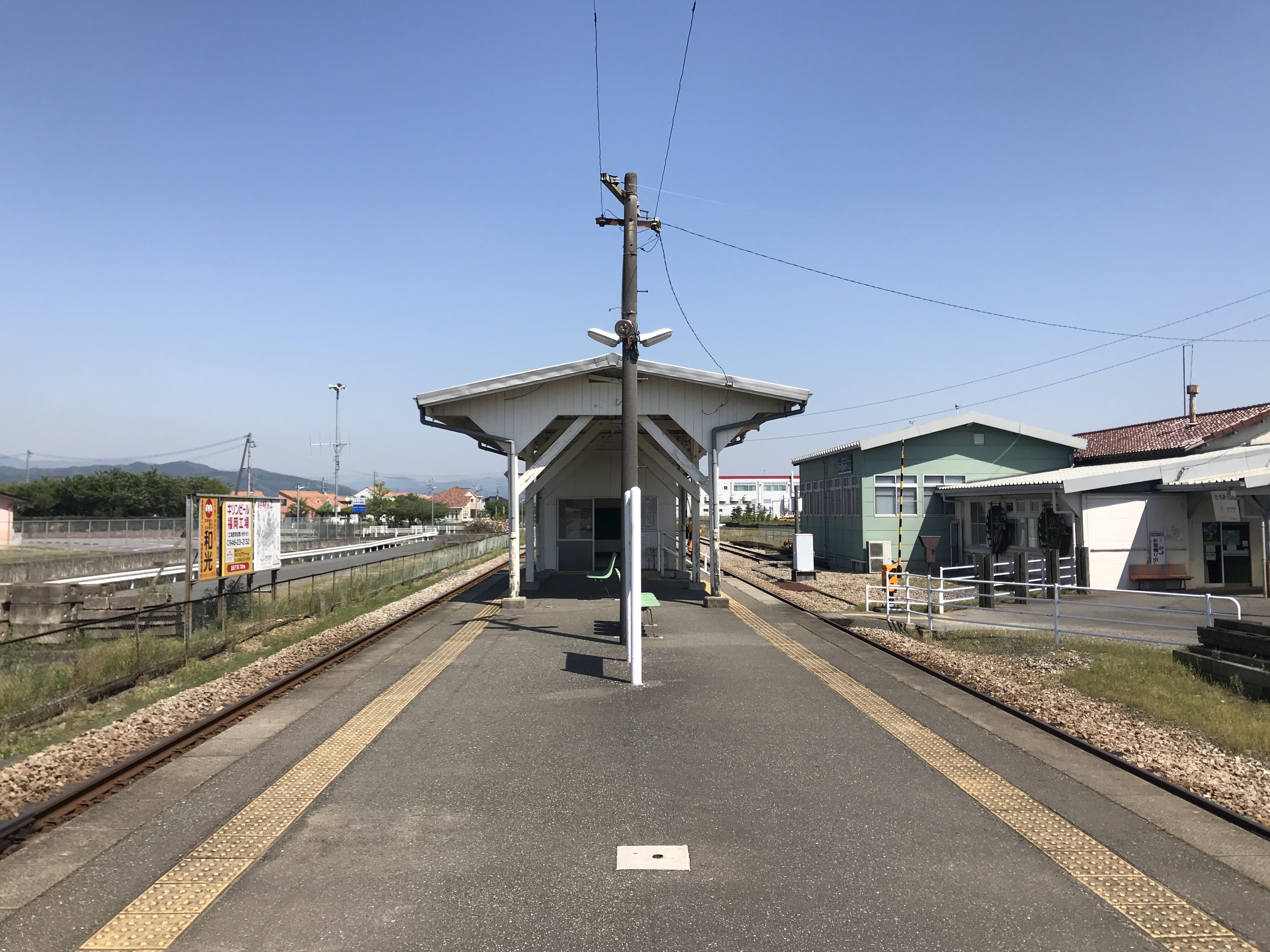 太刀洗駅のホーム(奥は高田方面)